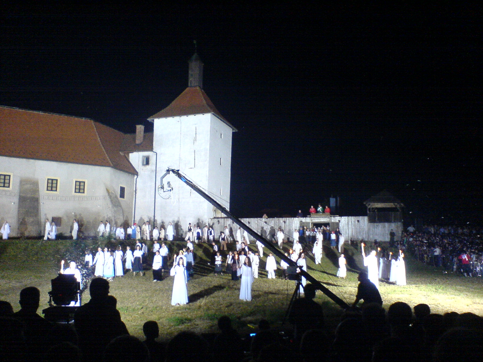 Scenska predstava koja se događa svake godine zadnji vikend mjeseca lipnja u Đurđevcu (Hrvatska). Govori o pobjedi nad Turcima.